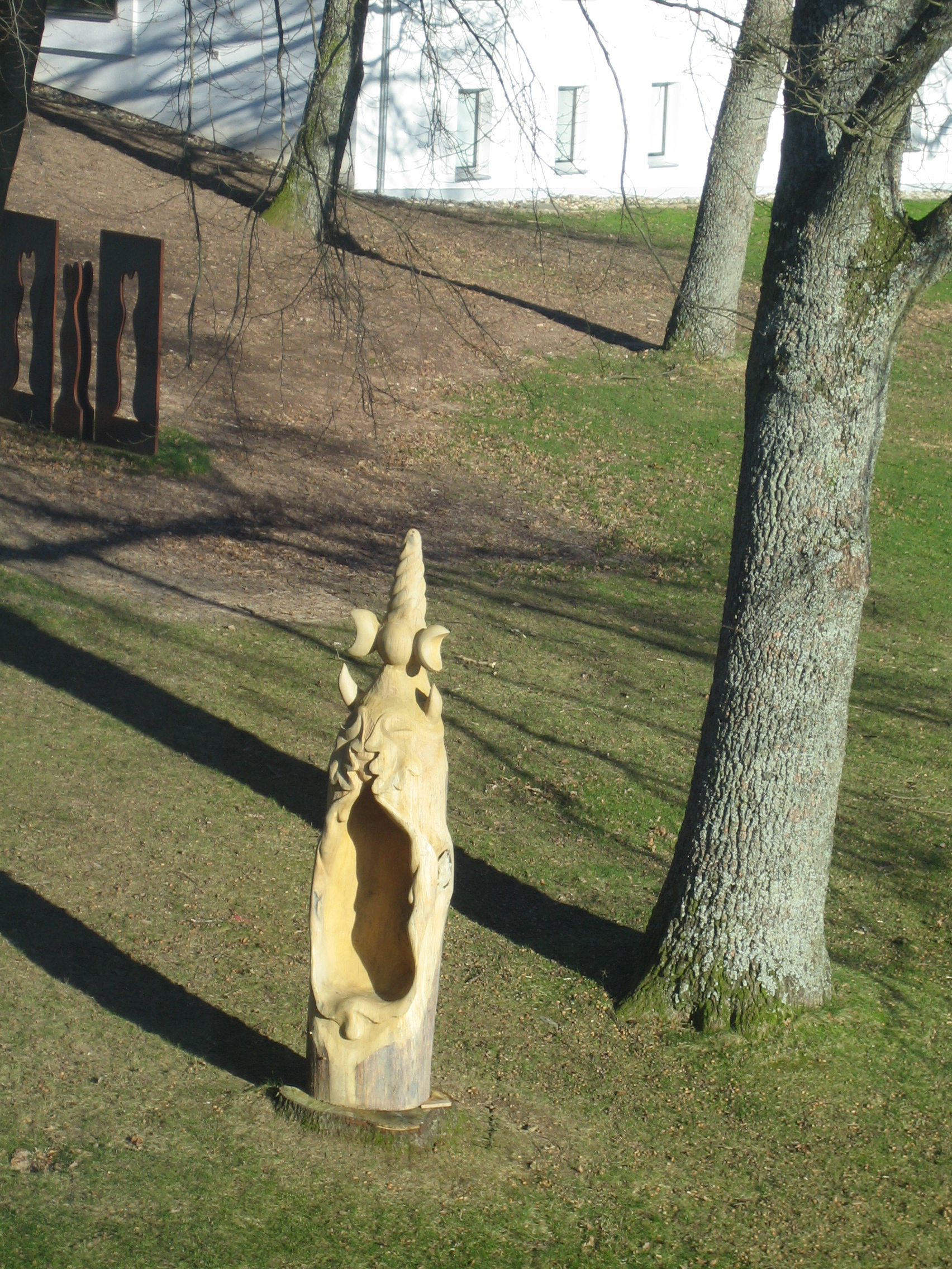 Académie Européenne d'Otzenhausen - Sculptures sur la pelouse entre le bâtiment principal (accueil) et les bâtiments B et C.On remarque : une sculpture plate, dressée un peu comme une barrière, de couleur assez sombre, à gauche. Il s'agit d'un alignement de 2 planches (ou plaques de métal) évidées en forme de pochoirs dont les 2 morceaux en surplus s'élèvent entr'elles, symbolisant peut-être une fleur de type tulipe. au premier plan, une autre oeuvre en bois (tronc sculpté et partiellement évidé), ressemblant un peu à une statue "totem" (?) décorée de 2 visages se parlant ou s'embrassant, prolongés autour de l'évidement (en forme de petit siège ?) chacun par un bras et la forme d'une main tenant celle de l'autre personnage. Chacun des 2 visages est stylisé et fait penser aussi à une feuille d'arbre.